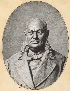 Ritratto di Michele Buonanno